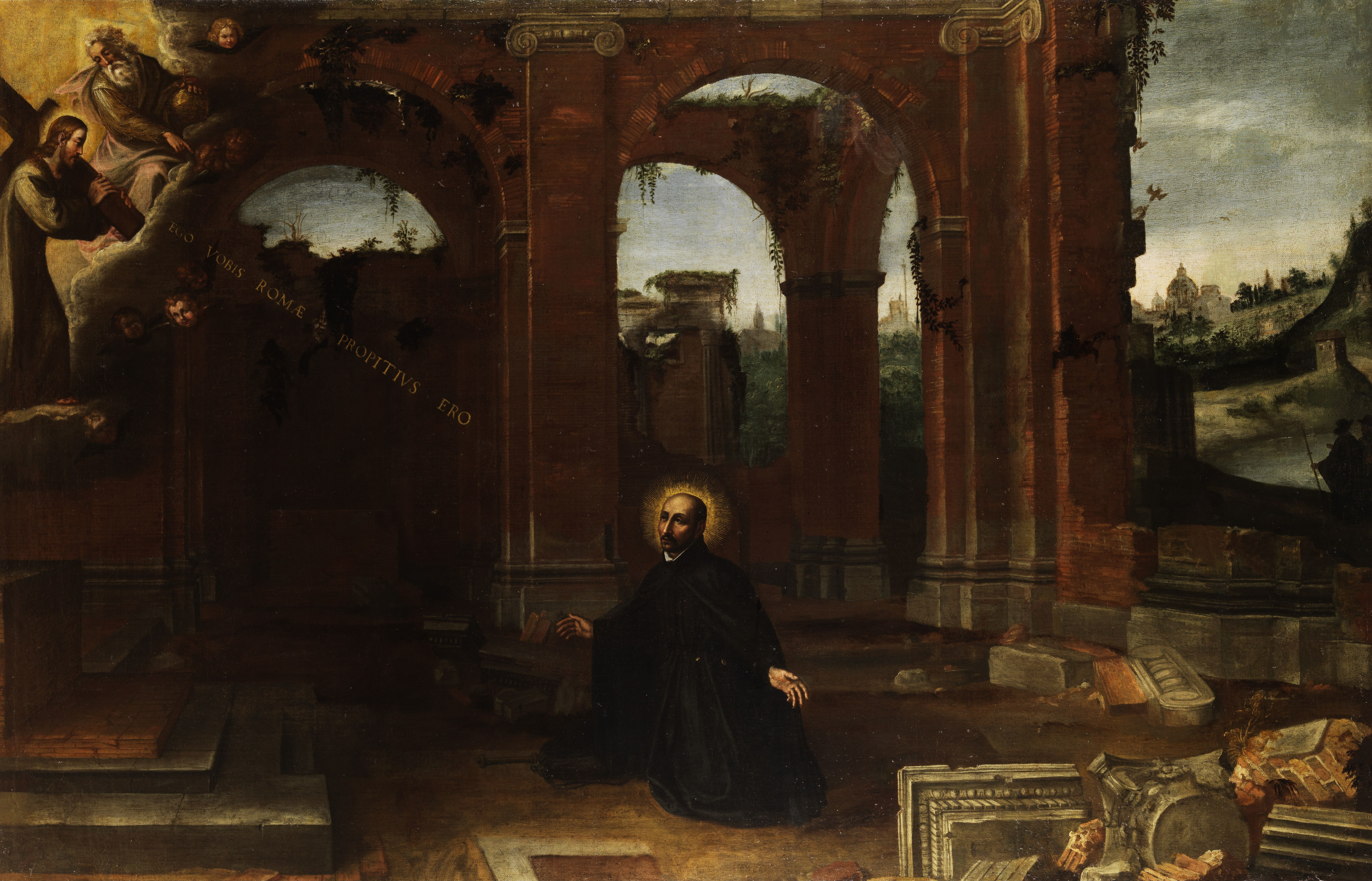 Die Vision des Ignatius von Loyola.